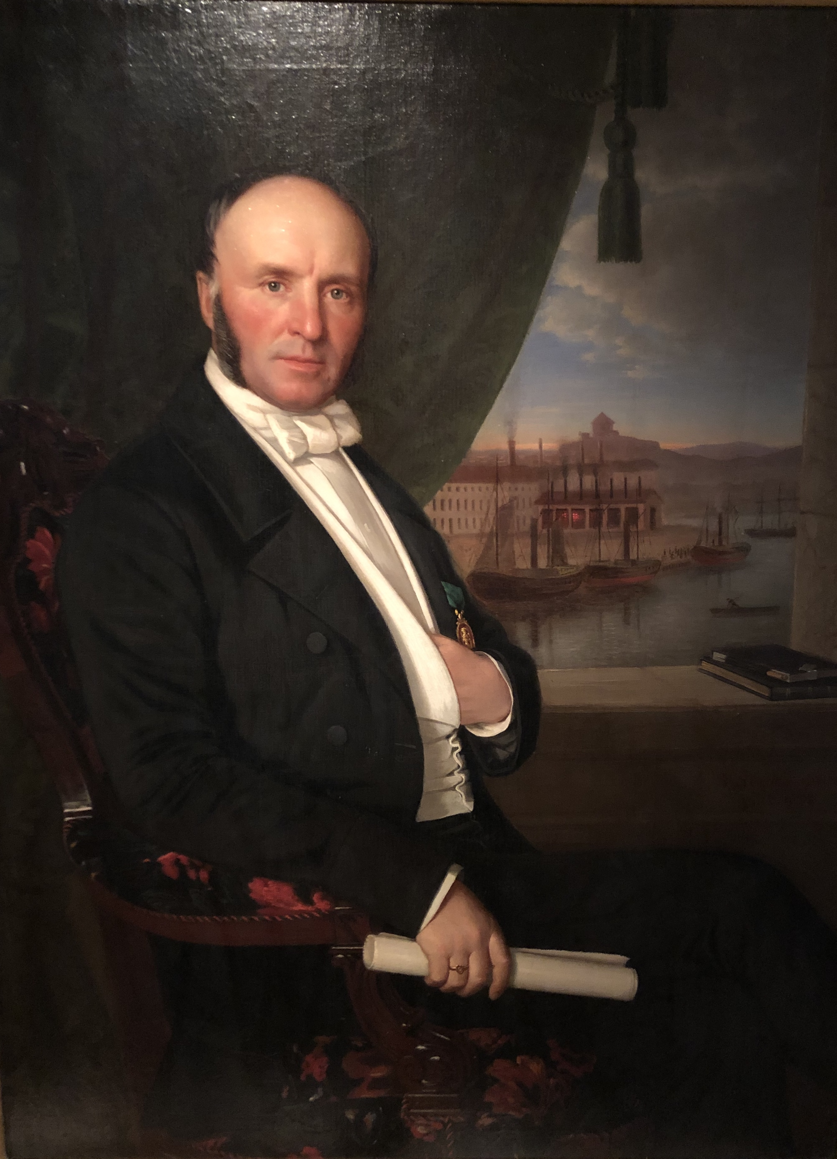 Porträtt av Alexander Keiller, iklädd kostym. På bröstet bär han Vasaordens riddartecken. I bakgrunden syns Skansen Kronan, samt hamnen i Göteborg. Okänd konstnär ca 1850.